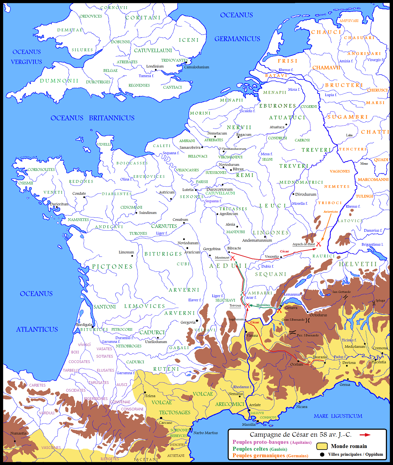 La Gaule en 58 av. J.-C. / Première année de campagne de César